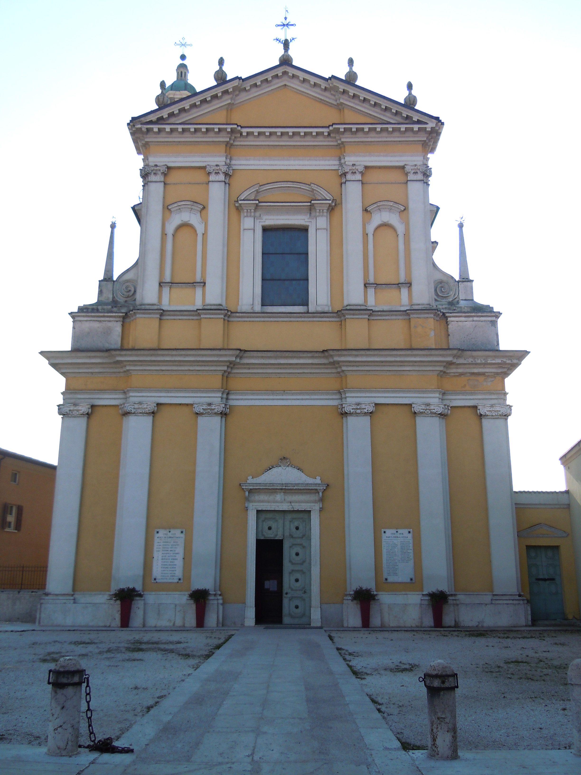 Roverbella, la chiesa parrocchiale dell'Annunciazione della Beata Vergine Maria e di San Gregorio Magno.